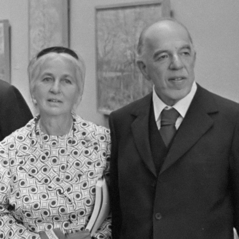 Prins Bernhard reikt Erasmusprijs uit in Van Goghmuseum aan Sir Ernst Gombrich en jhr. W. Sandberg; Sandberg, Prins Bernhard 19 september 1975